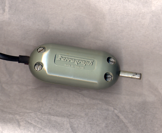 Entmagnetisierdrossel von Ferrograph